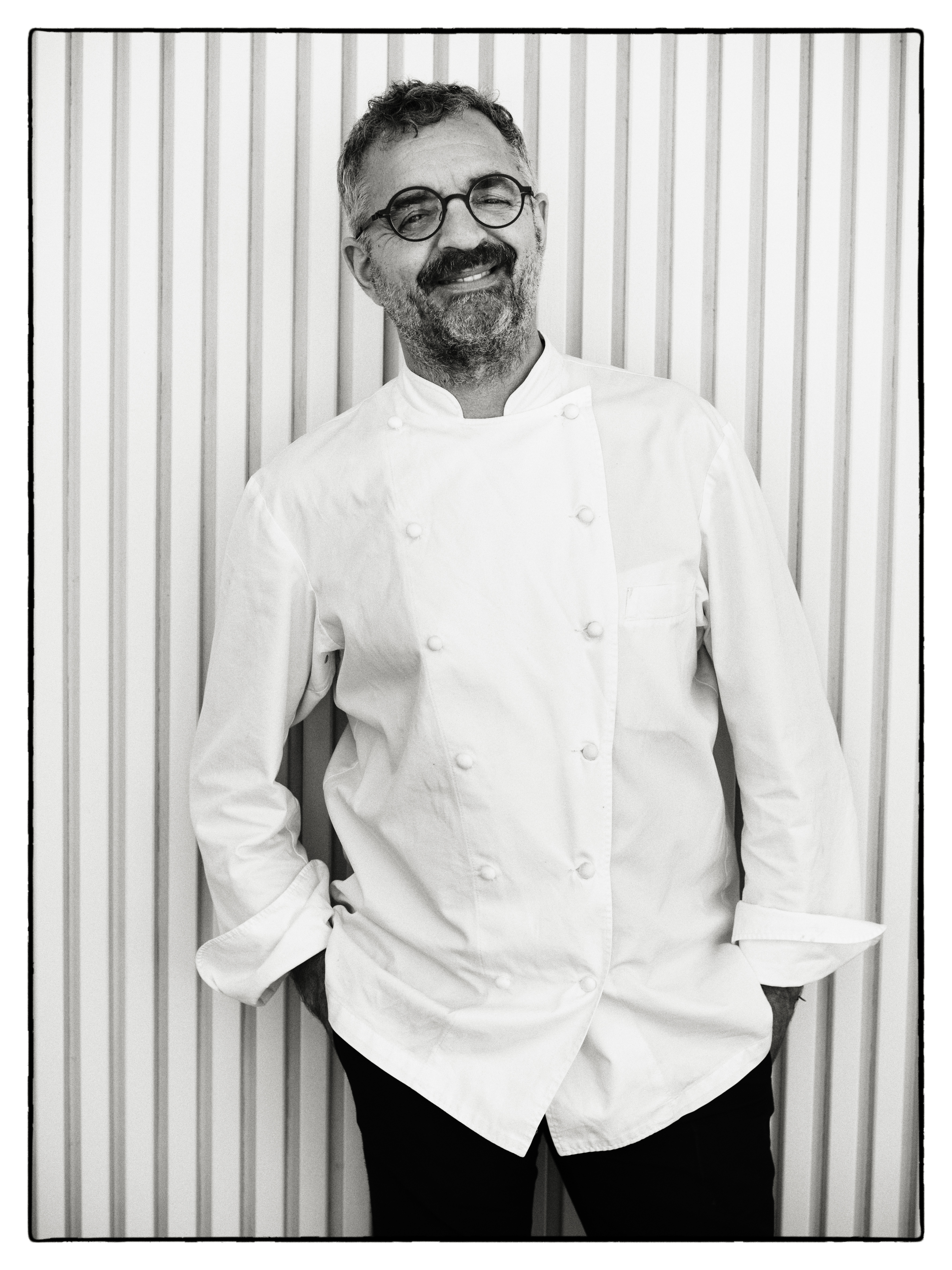 Cuoco italiano